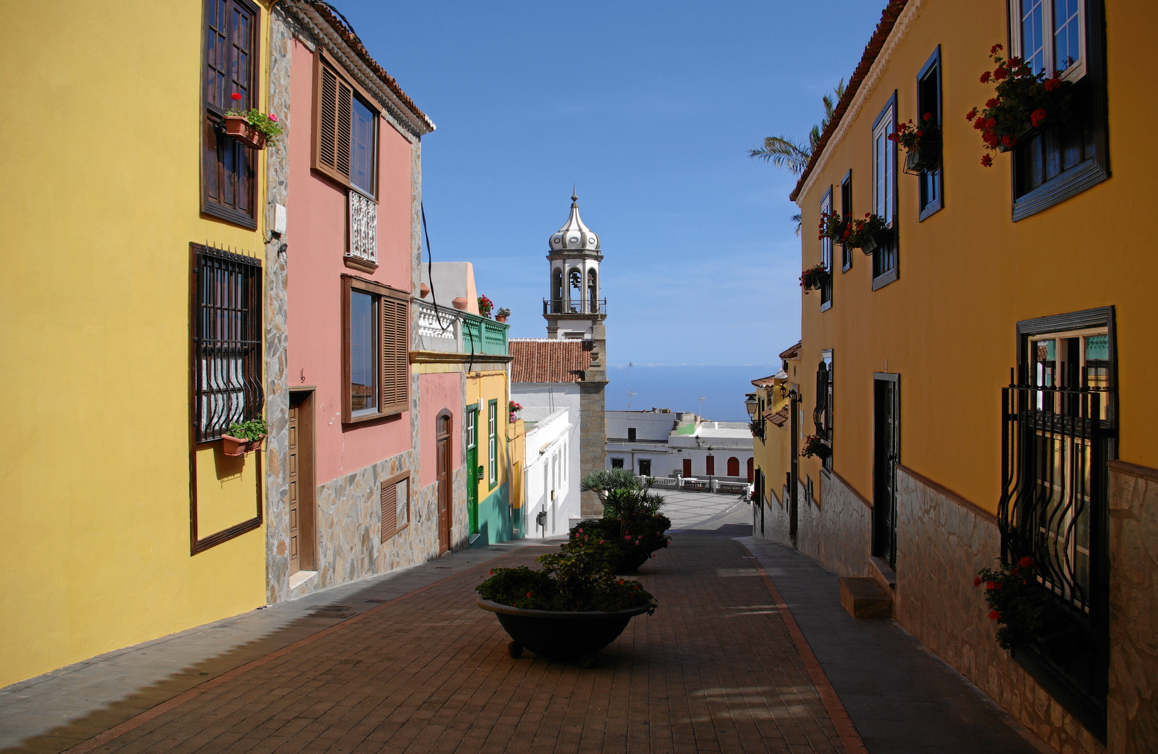 Teneriffa, Grandilla de Abona